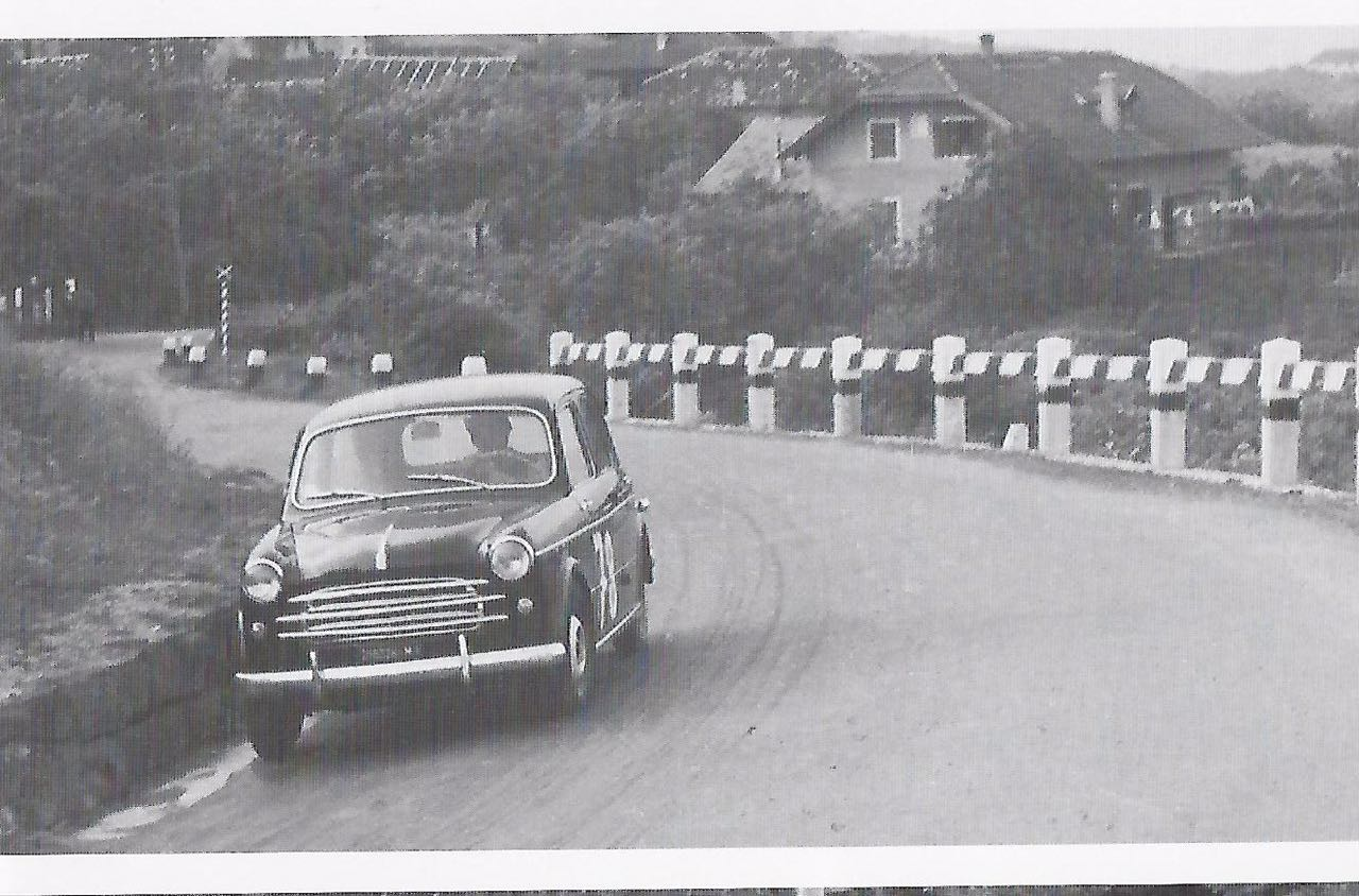 Lorenzo Bandini impegnato nella Bolzano-Mendola del 1956, al volante della Fiat 1100-103.